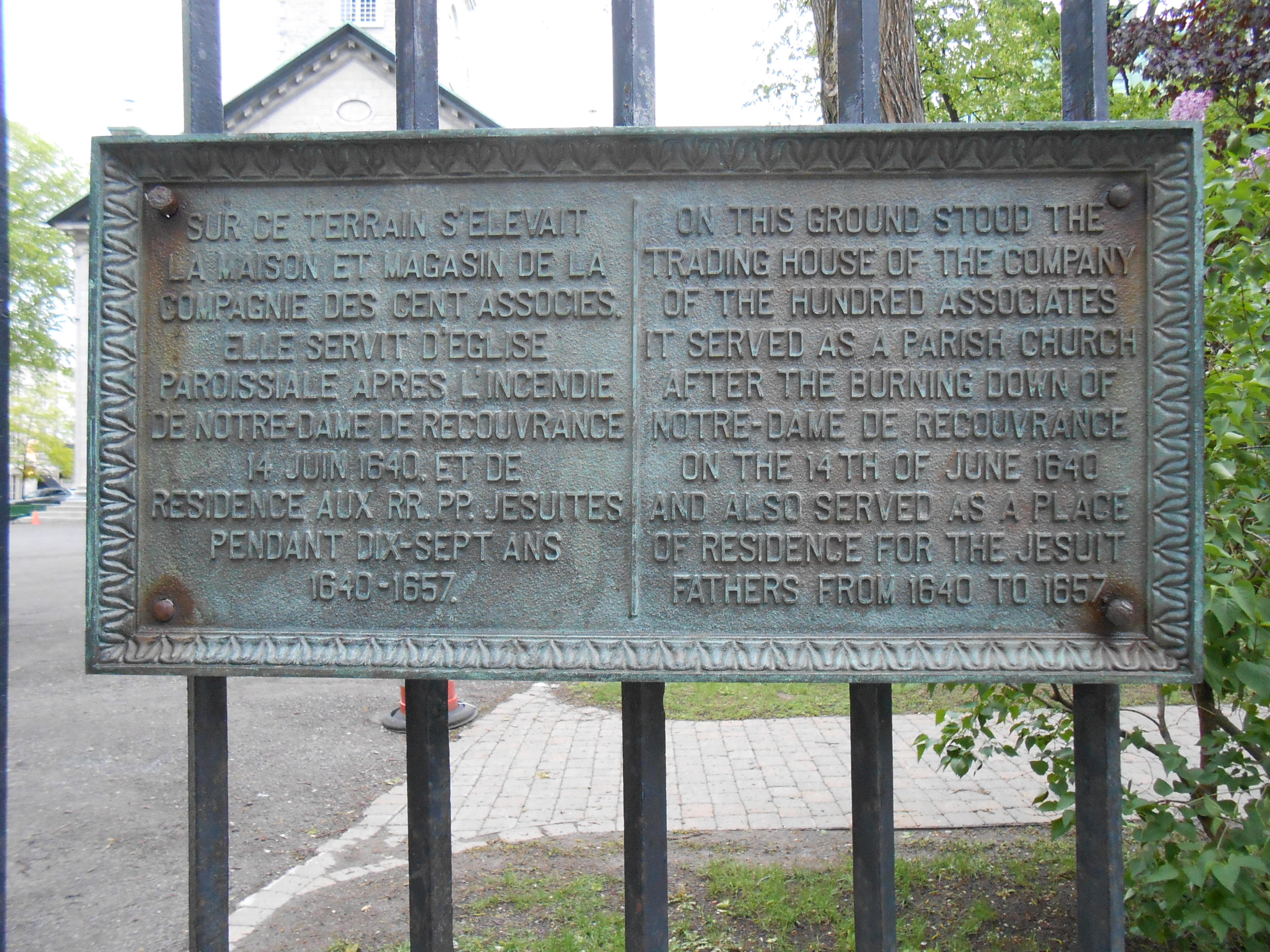 Plaque apposée à la clôture d'un terrain appartenant au diocèse anglican de Québec. On peut y lire : « Sur ce terrain s'élevait la maison et magasin de la Compagnie des Cent Associés. Elle servit d'église paroissiale après l'incendie de Notre-Dame de Recouvrance 14 juin 1640, et de résidence aux RR. PP. Jésuites pendant dix-sept ans 1640-1657. »